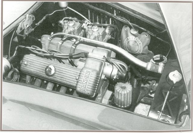 Foto del vano motore Bandini 1000 GT tratta dal libro Bandini